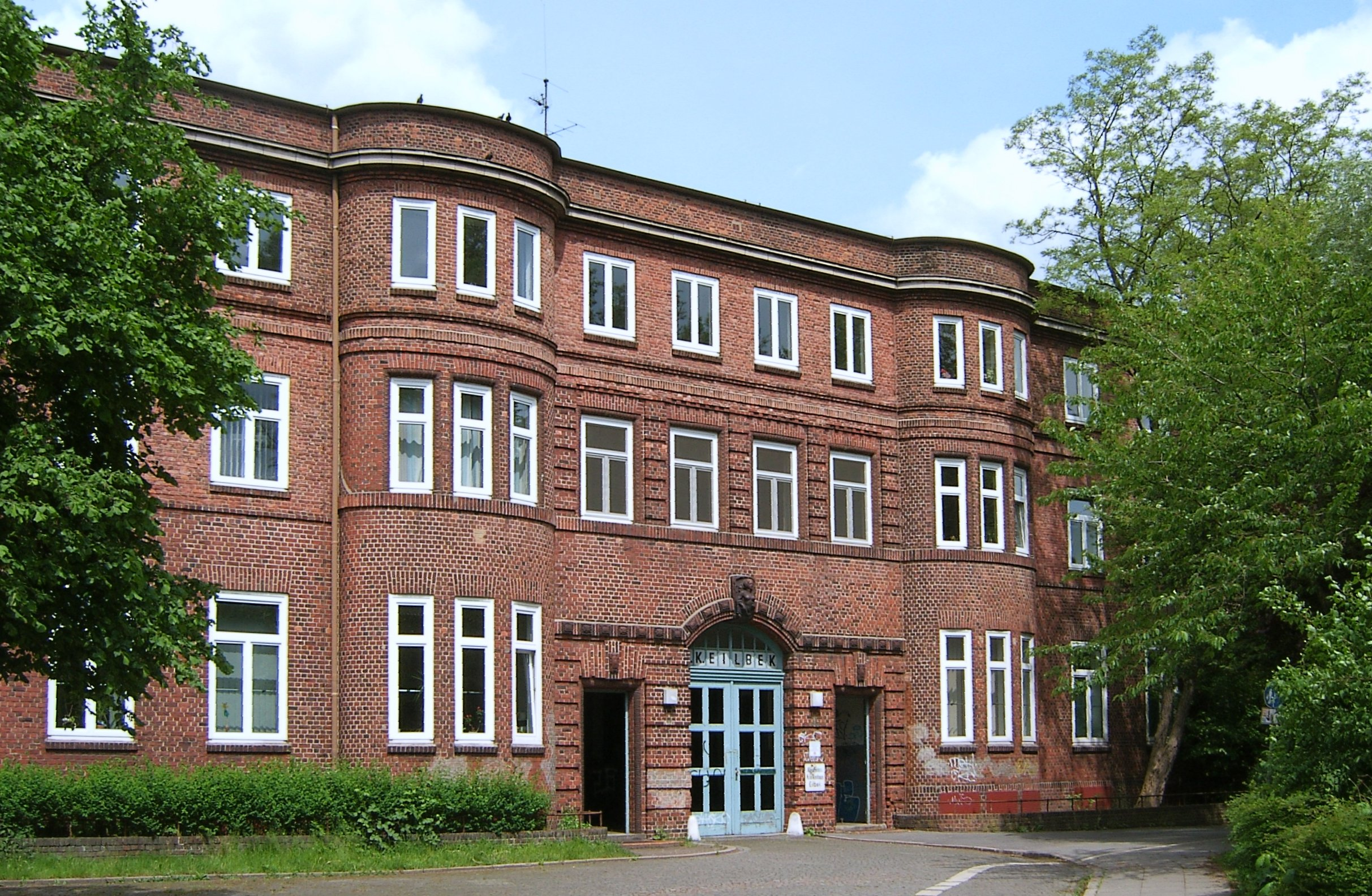 Hamburg, ehemaliger Haupteingang der "Staatskrankenanstalt Friedrichsberg" bzw. des "Allgemeinen Krankenhauses Eilbek", erbaut von Fritz Schumacher, 2014 abgerissen zugunsten eines Neubaus